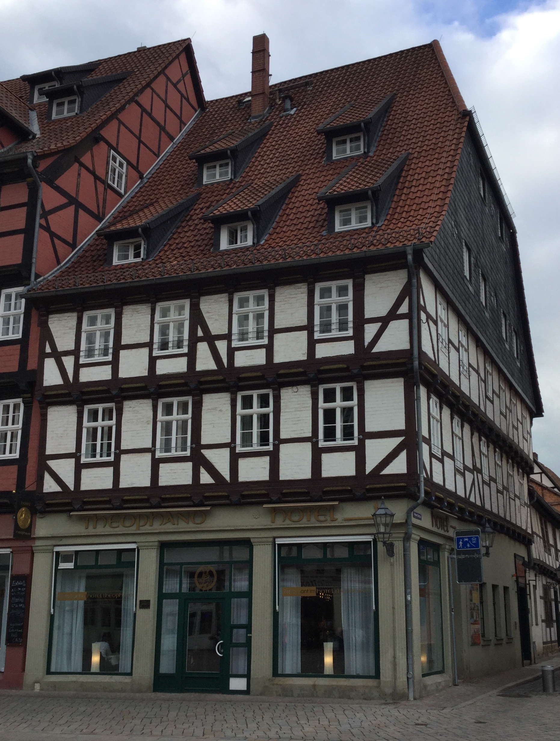 Haus Markt 14 in Quedlinburg